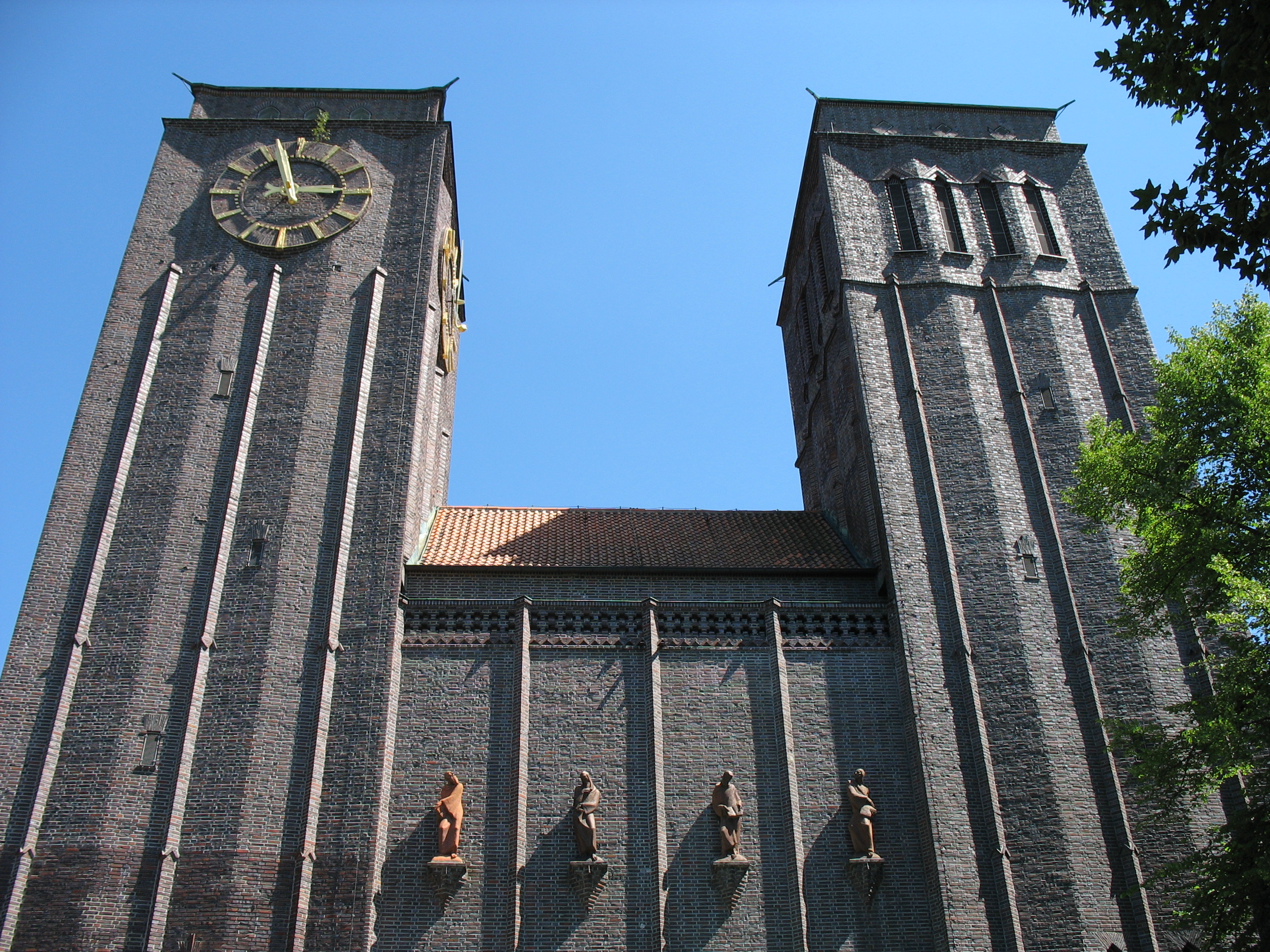 Pfarrkirche St. Anton, Augsburg